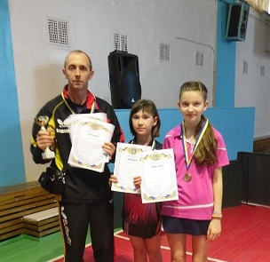 Алина Выдрученко